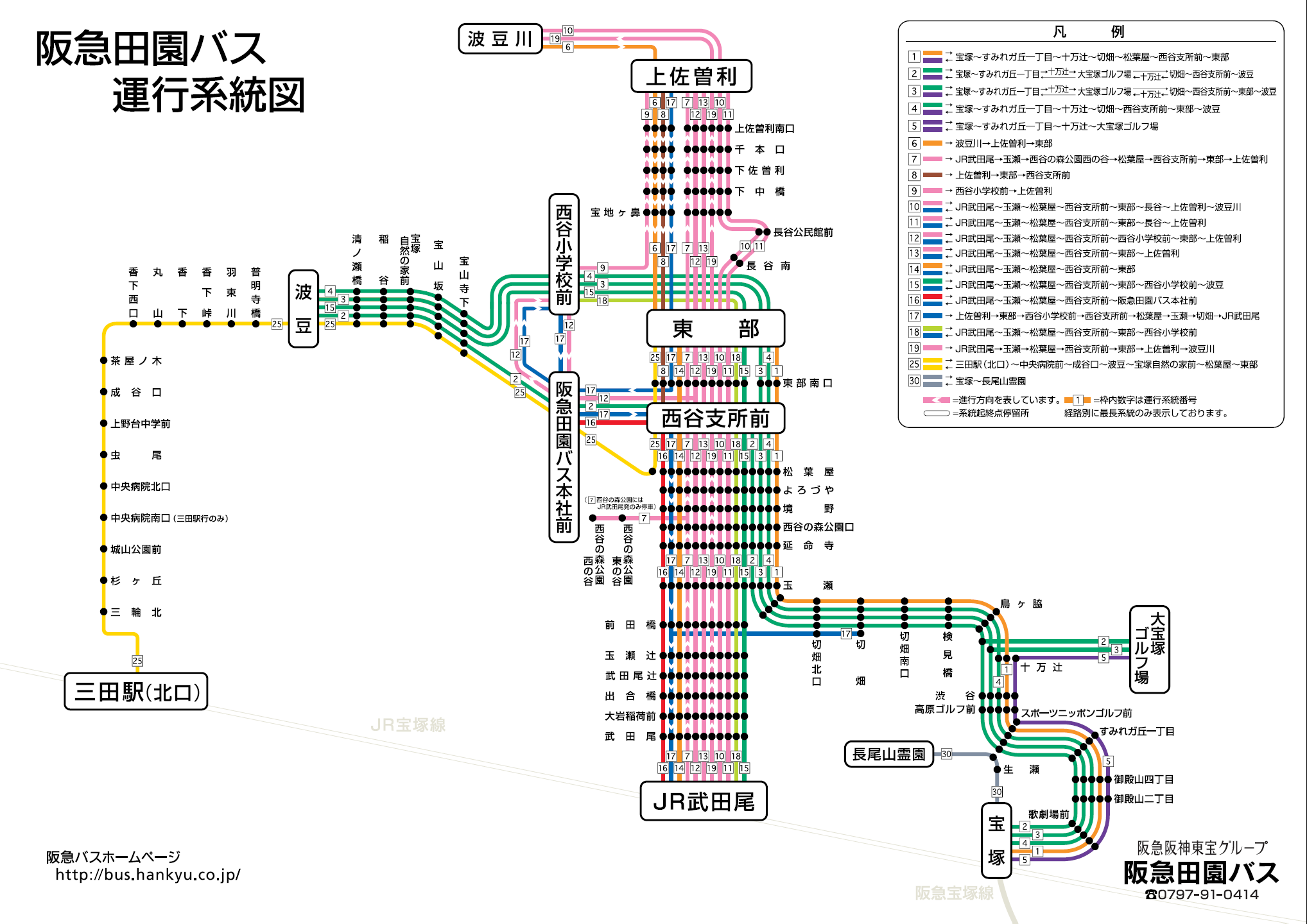 2014年7月1日現在の運行系統図